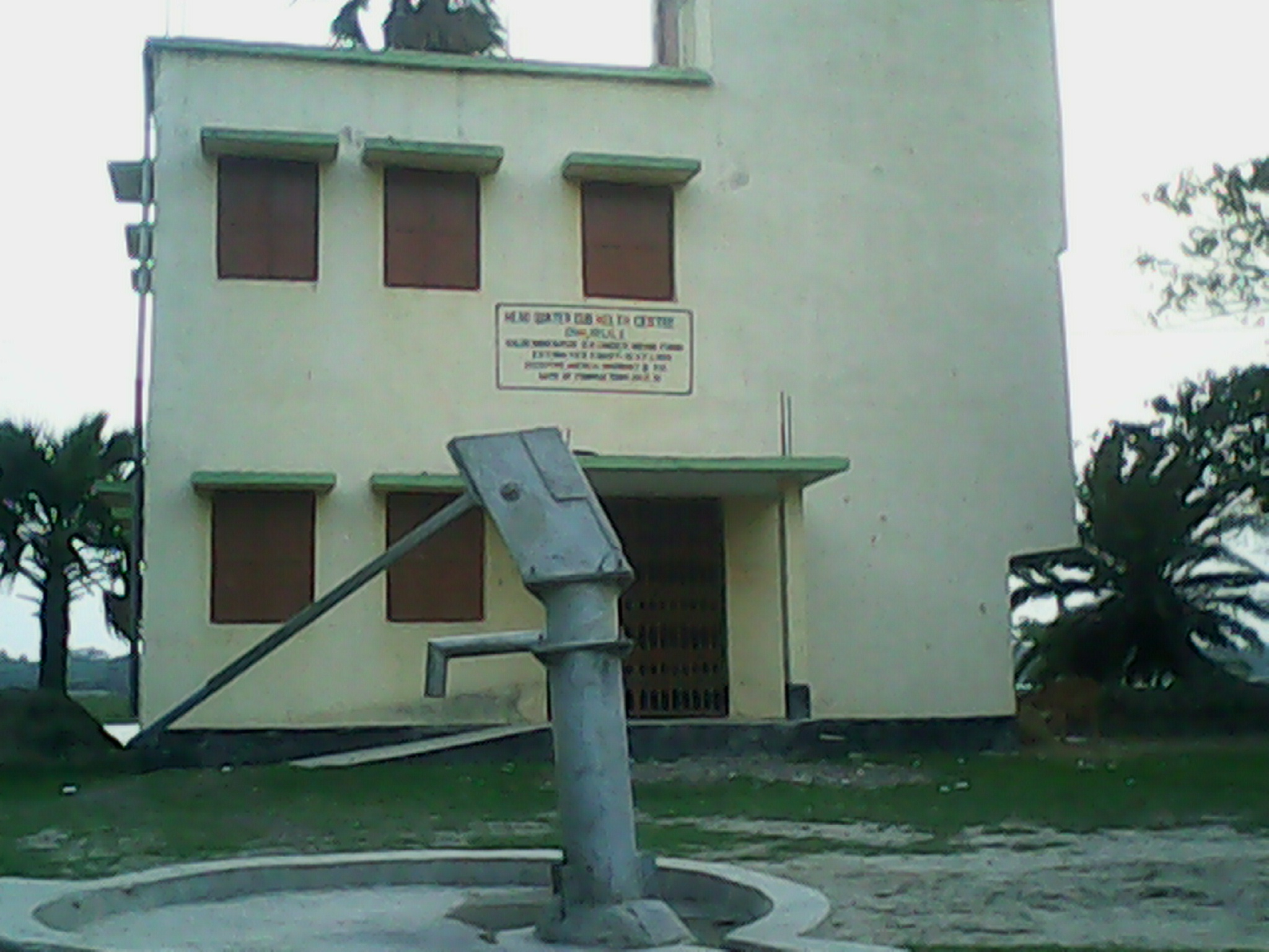 Jhuruli Heatcare